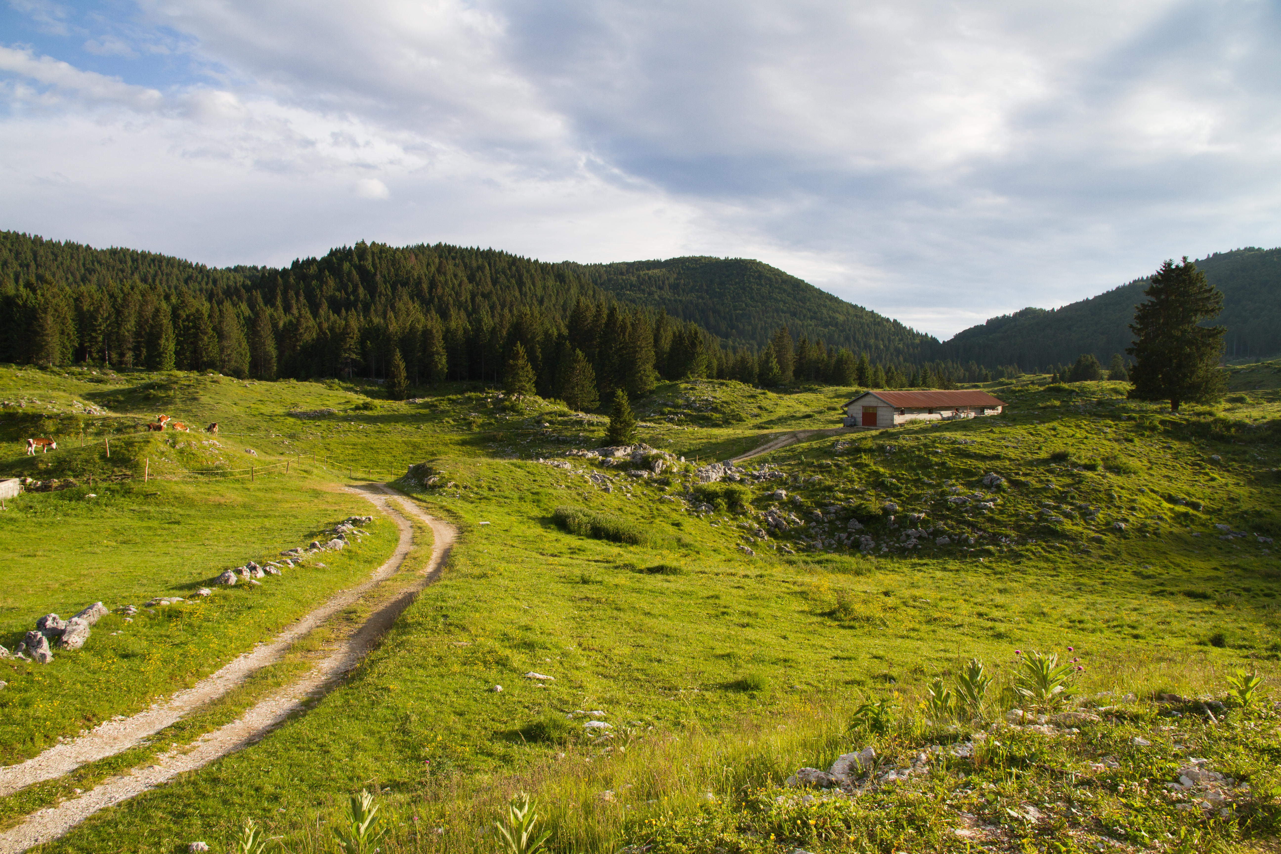 Altopiano dei Sette Comuni (Q49962786)